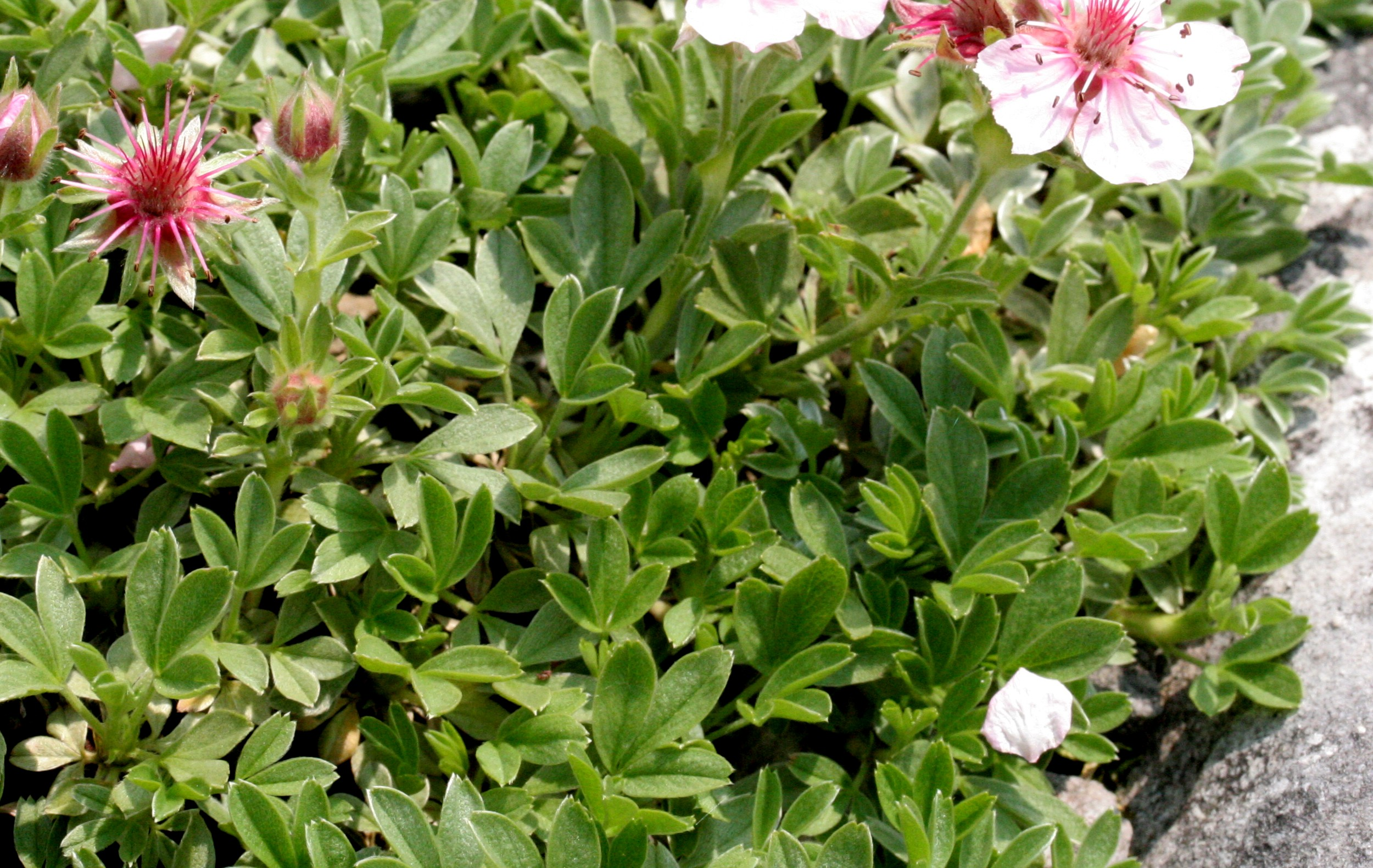 Potentilla_nitida (Cinquefoglia delle Dolomiti) Giardino Botanico Alpino "Giangio Lorenzoni" (loc. Pian Cansiglio), Tambre d'Alpago (BL), quota 1000 m s.l.m.